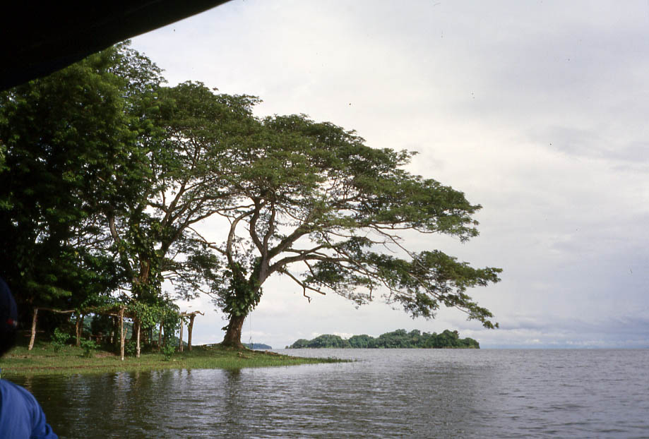 Archipiélago de Solentiname. 2002